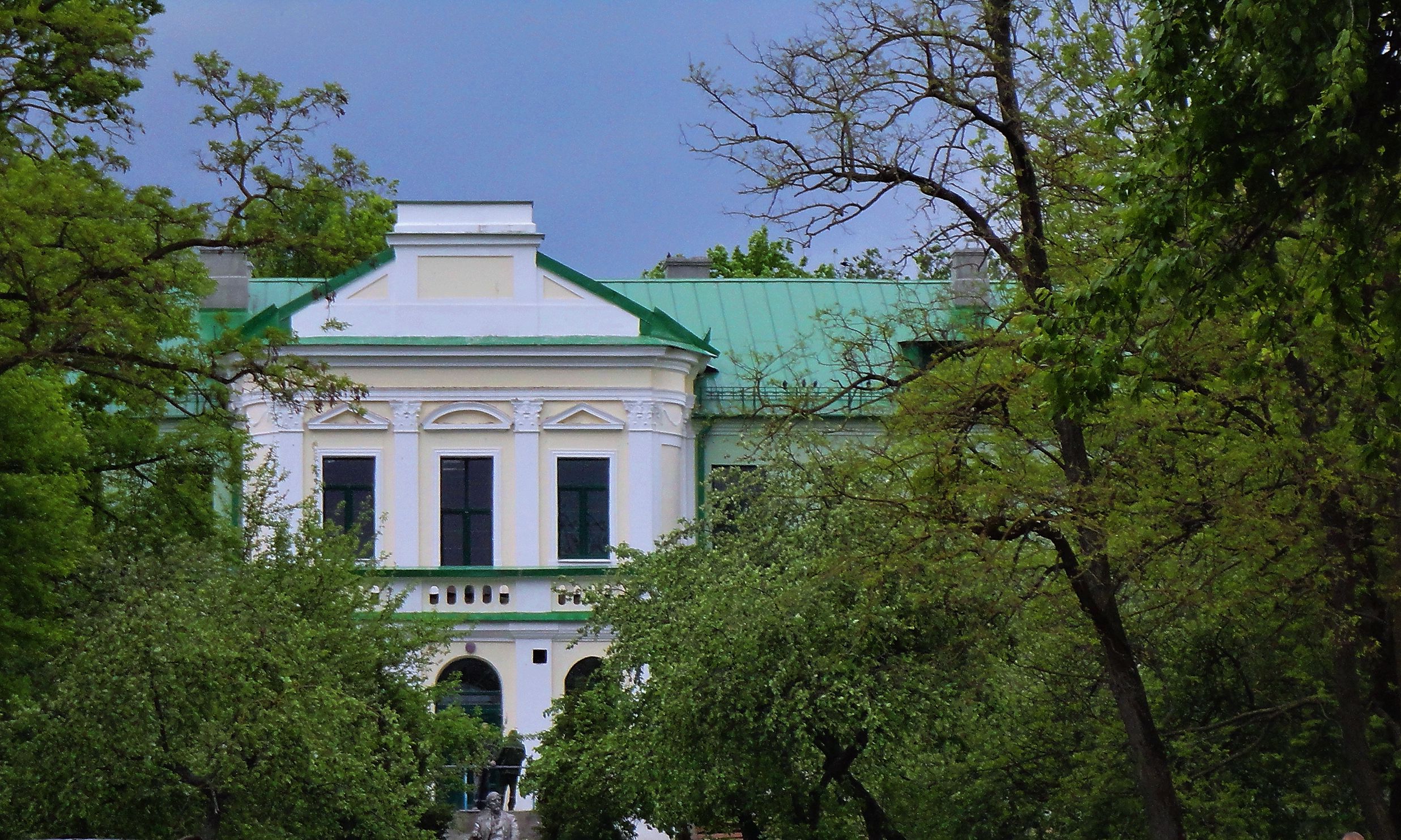 Дворец в Станиславово